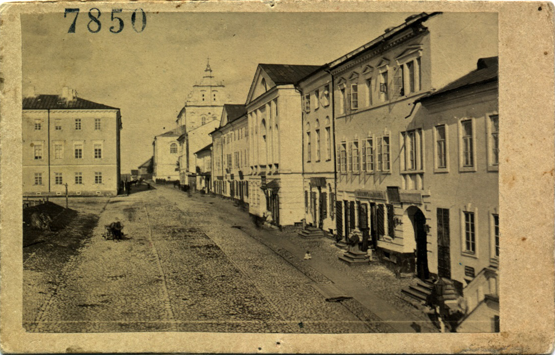 Валоцкая вуліца ў Мінску, удалечыні на рагу з Дамініканскай - касцёл Святога Тамаша Аквінскага Беларуская (тарашкевіца): Менск (Miensk), пляц Высокі Рынак (plac Vysoki Rynak) у бок вуліцы Валоцкай (vulica Vałockaja). Удалечыні на рагу з Дамініканскай — касьцёл Сьвятога Тамаша Аквінскага